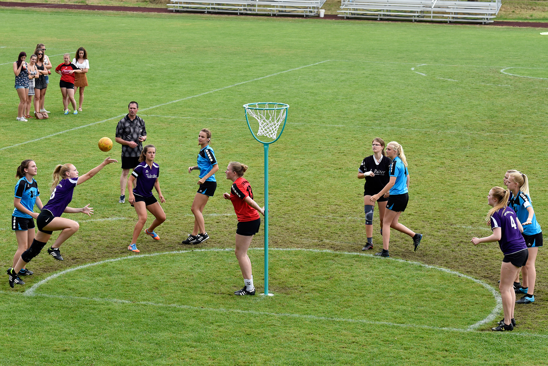 Szene aus dem Spiel des TSV Stötten gegen den TSV Werneck (Altersklasse Jugend 19) bei den Bayerischen Meisterschaft im Feldkorbball 2016 in Euerbach.